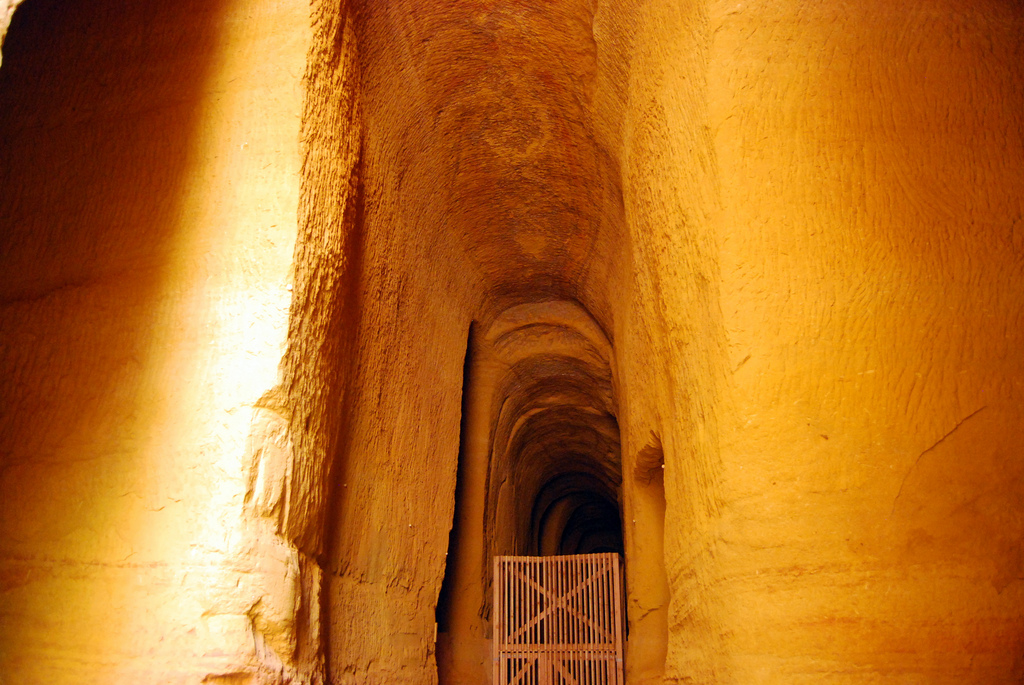 Galerie creusée dans l'ocre menant aux mines du Bruoux